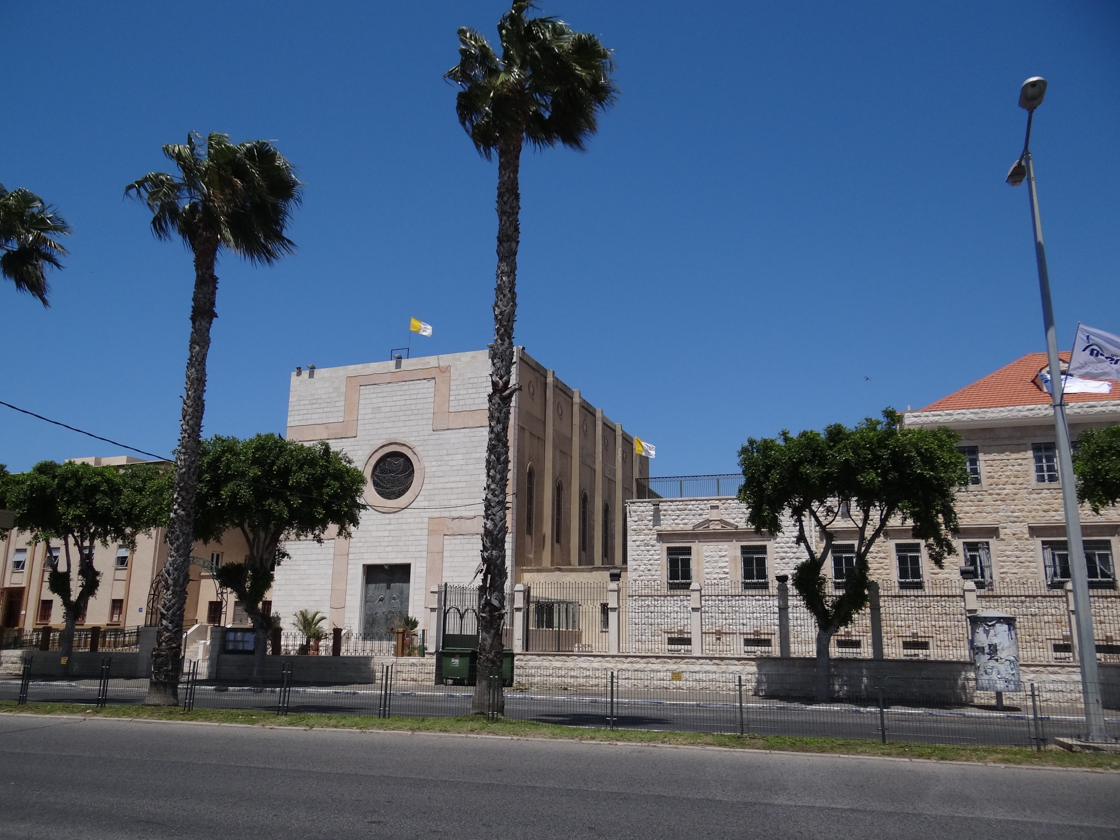 Saint Joseph's Latin Parish, Haifa Israel סיינט גוזף, הכנסייה הלטינית, שוכנת בחיפה בשדרות המגינים. מבני הקהילה כוללים ברת בית הספר כרמל בשדרות המגינים 76, מבנה הכנסייה בשדרות המגינים 78, ומבנה הקהילה בשדרות המגינים 80 מימין בית ספר כרמל משמאל הכנסייה